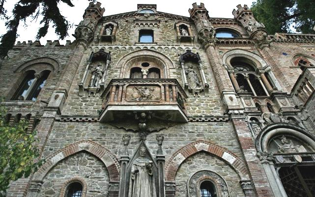 Facciata dell'edificio principale Licensing Categoria:Immagini di Teramo